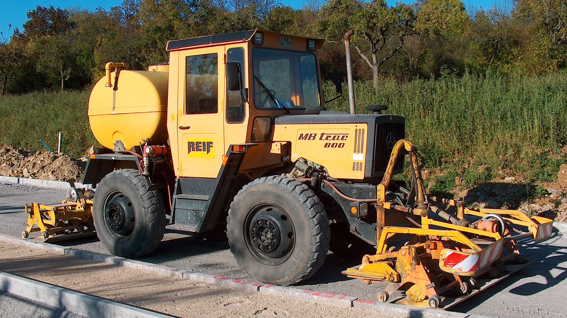 MB trac 800 mit Plattenverdichter